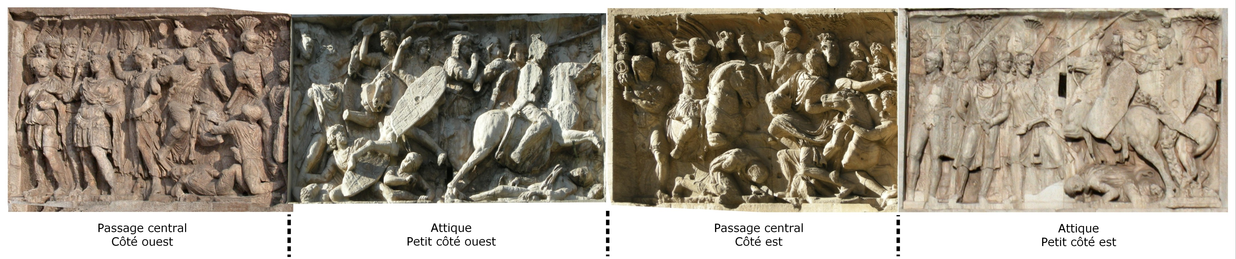 Reconstitution d'une partie de la Grande Frise de Trajan à partir des panneaux réemployés sur l'Arc de Constantin. (voir la légende sur l'image pour la position des panneaux sur l'arc)